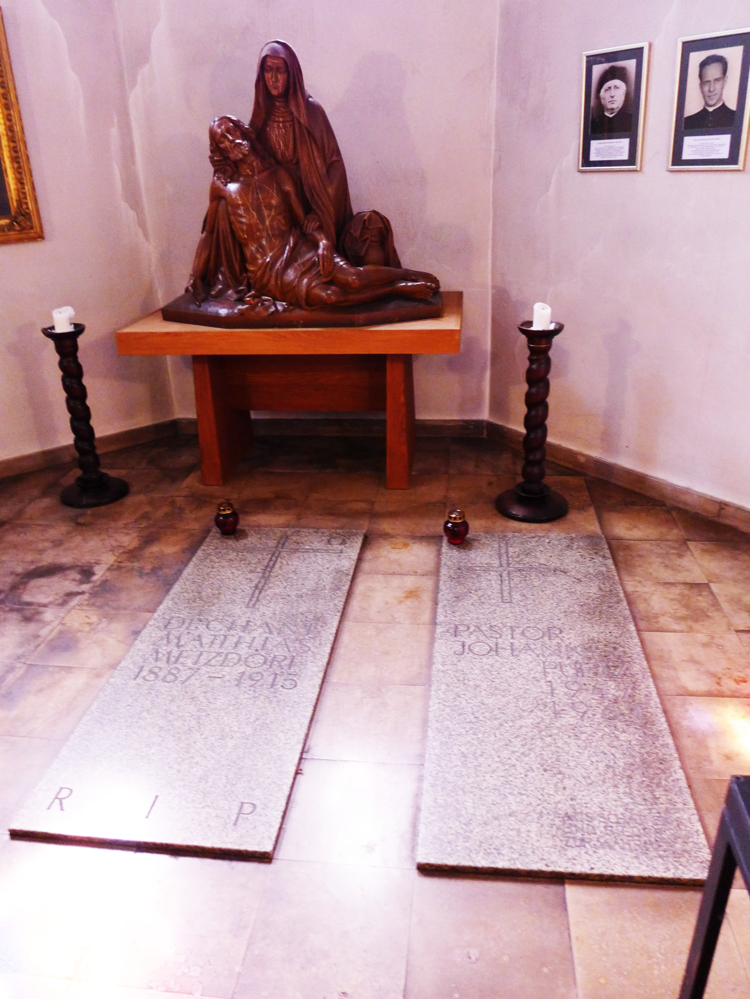 St. Josef (Saarbrücken), Grabkapelle von Pfarrer Matthias Metzdorf und Pfarrer Johannes Pütz